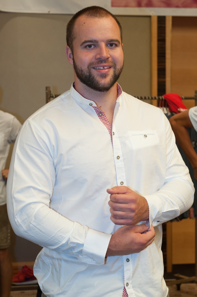 Einkleidung der Österreichischen Teilnehmer an den Olympischen Sommerspielen 2016 am 16./17. Juli 2016 in Wien. Bild zeigt Lukas Weißhaidinger.